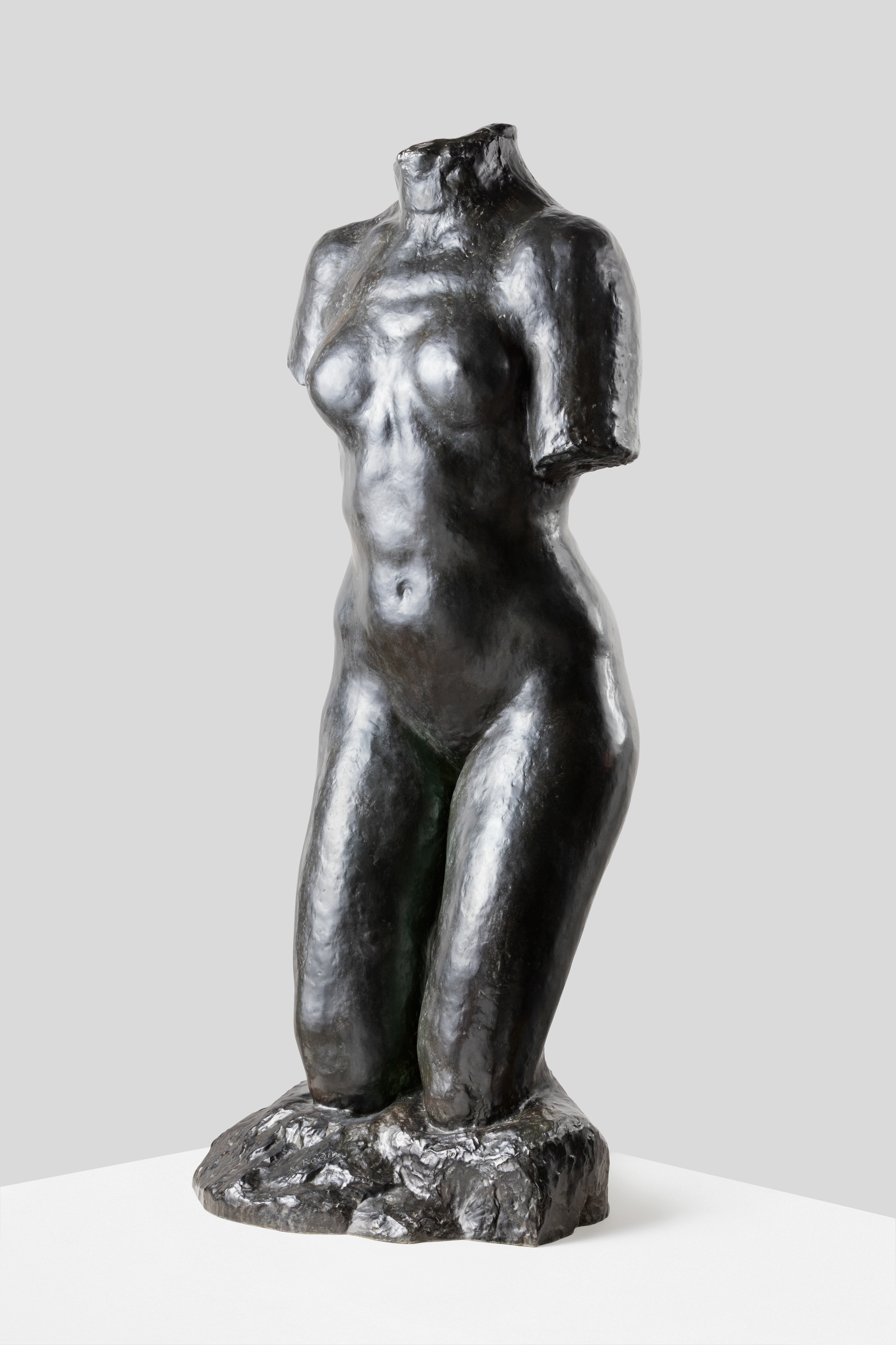 La era de Rodin Colección Museo Soumaya